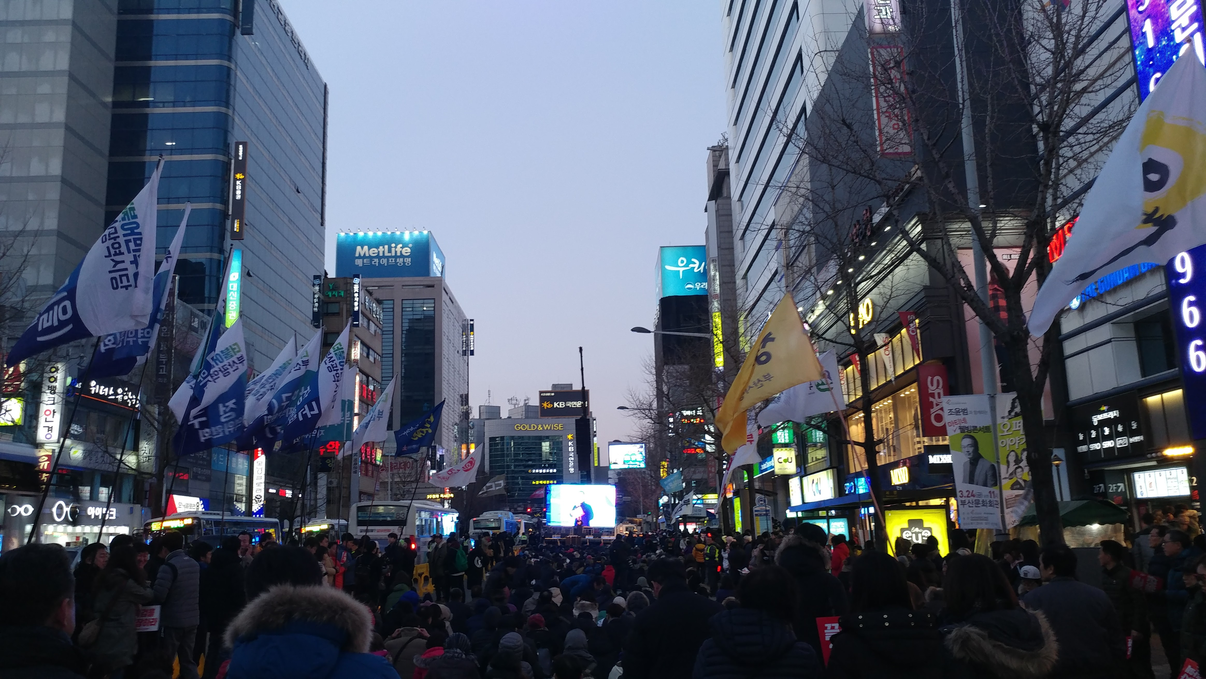 17년 2월 18일, 부산 서면에서 열린 박근혜 탄핵 요구 집회